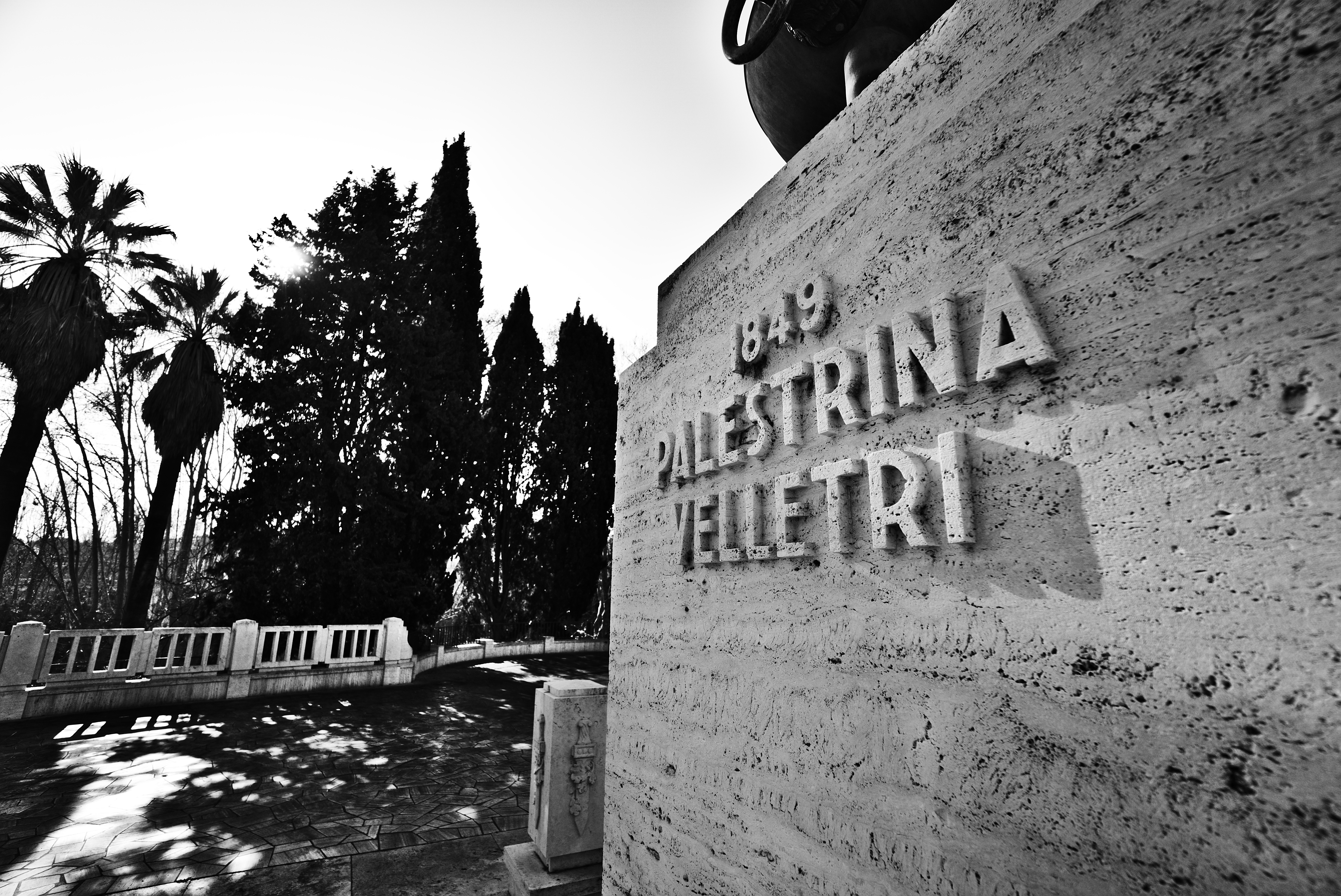 Epigrafe sul Mausoleo Ossario Garibaldino in ricordo delle battaglie di Palestrina e Velletri